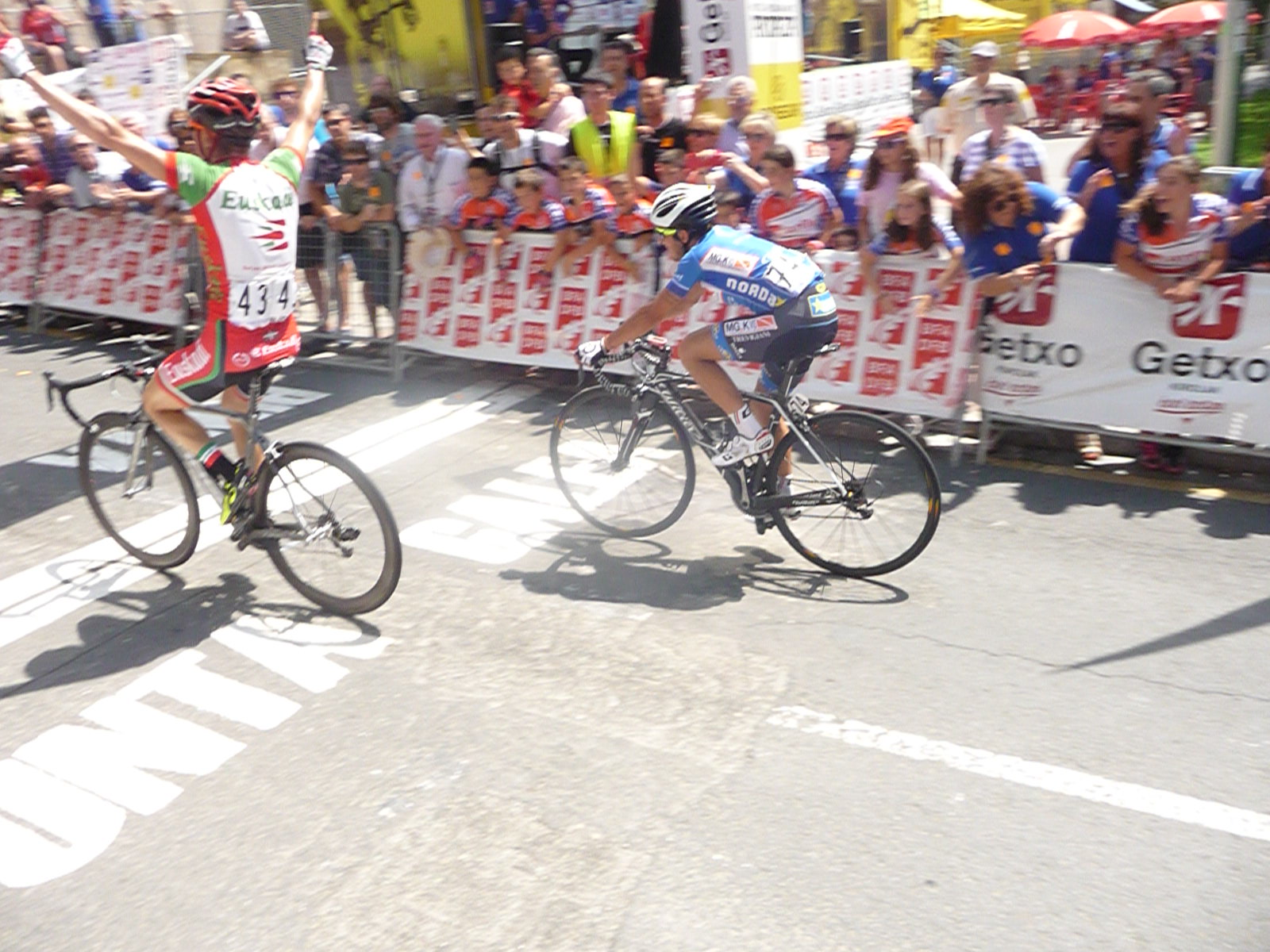 Carlos Barredo ganando en el Circuito de Getxo 2014